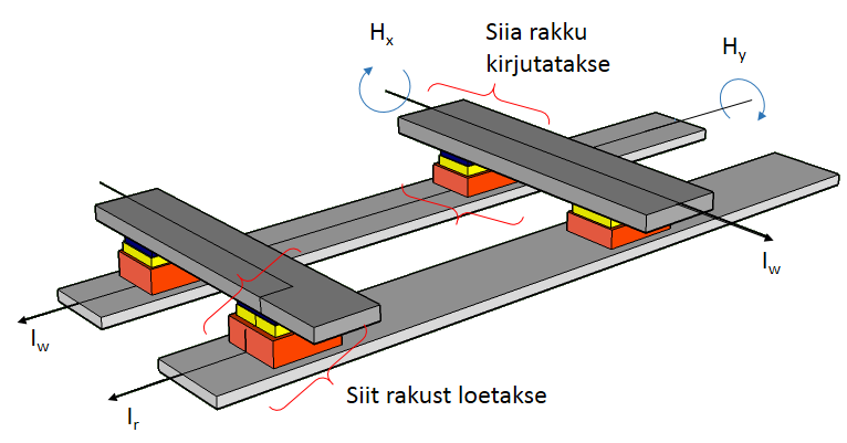 MRAM: lugemine, kirjutamine